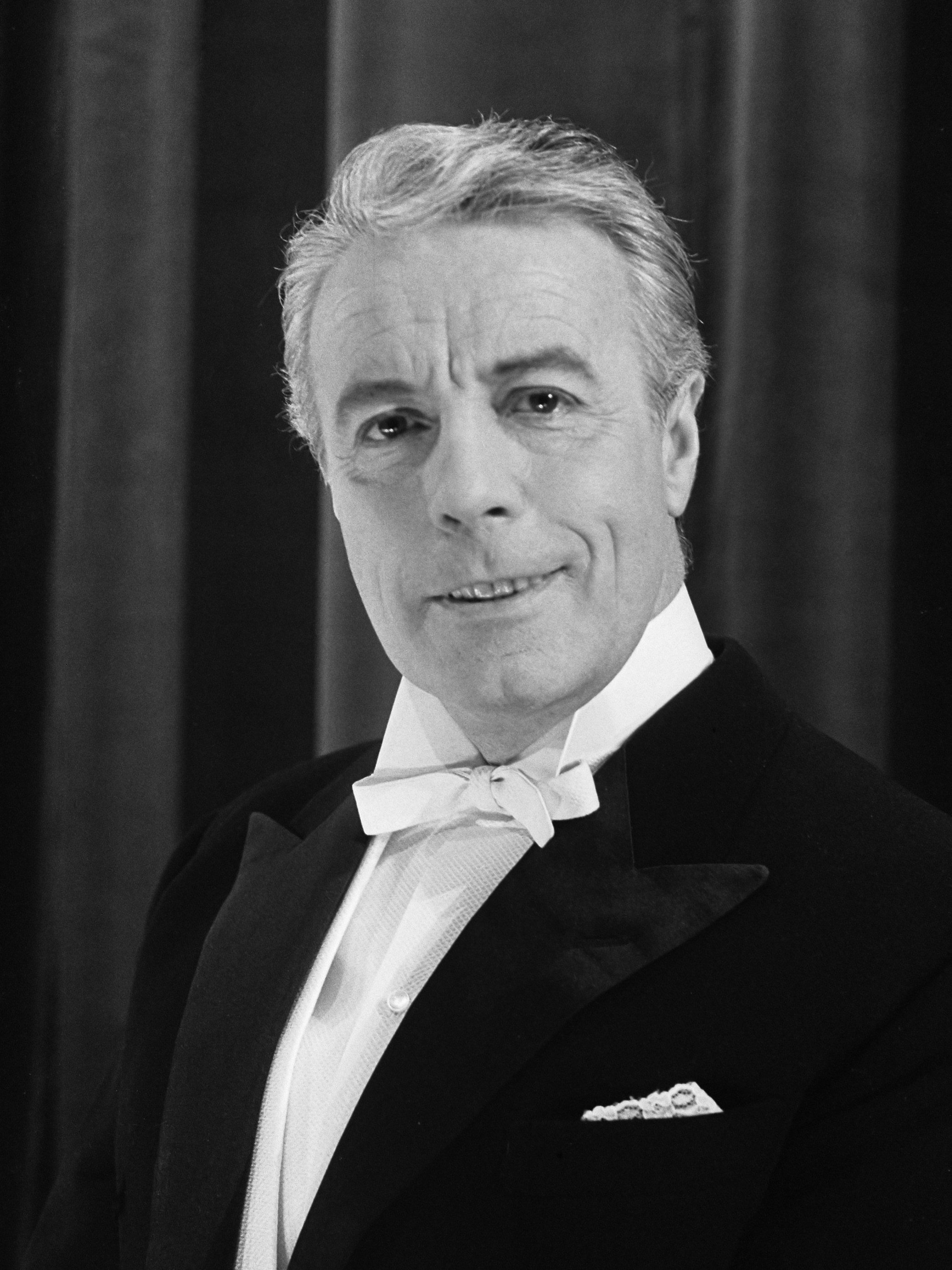 Musical "The Sound of Music" , Johan Heesters, repetitie in Carré 22 januari 1964